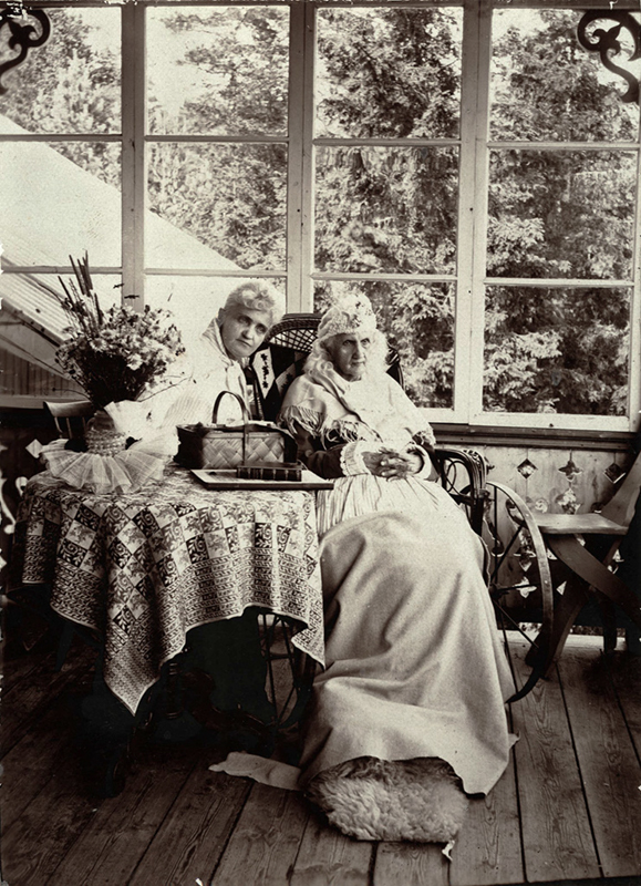 Depicted person: Wendela Hebbe, Författare, Journalist, Sverige (1808-1899); Signe Hebbe, Operasångerska, Teaterpedagog, Sverige (1837-1925)